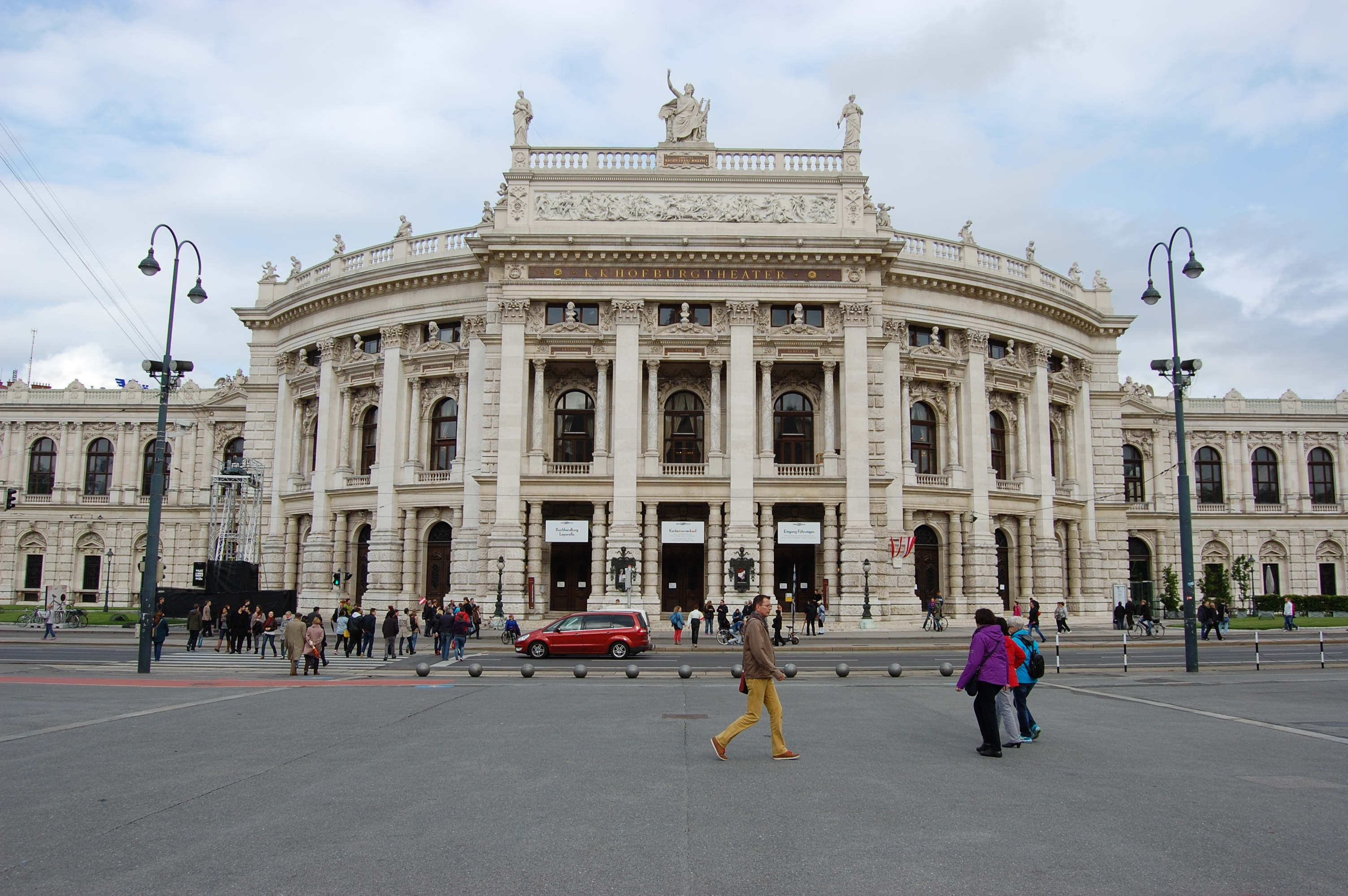 Innere Stadt, 1010 Vienna, Austria